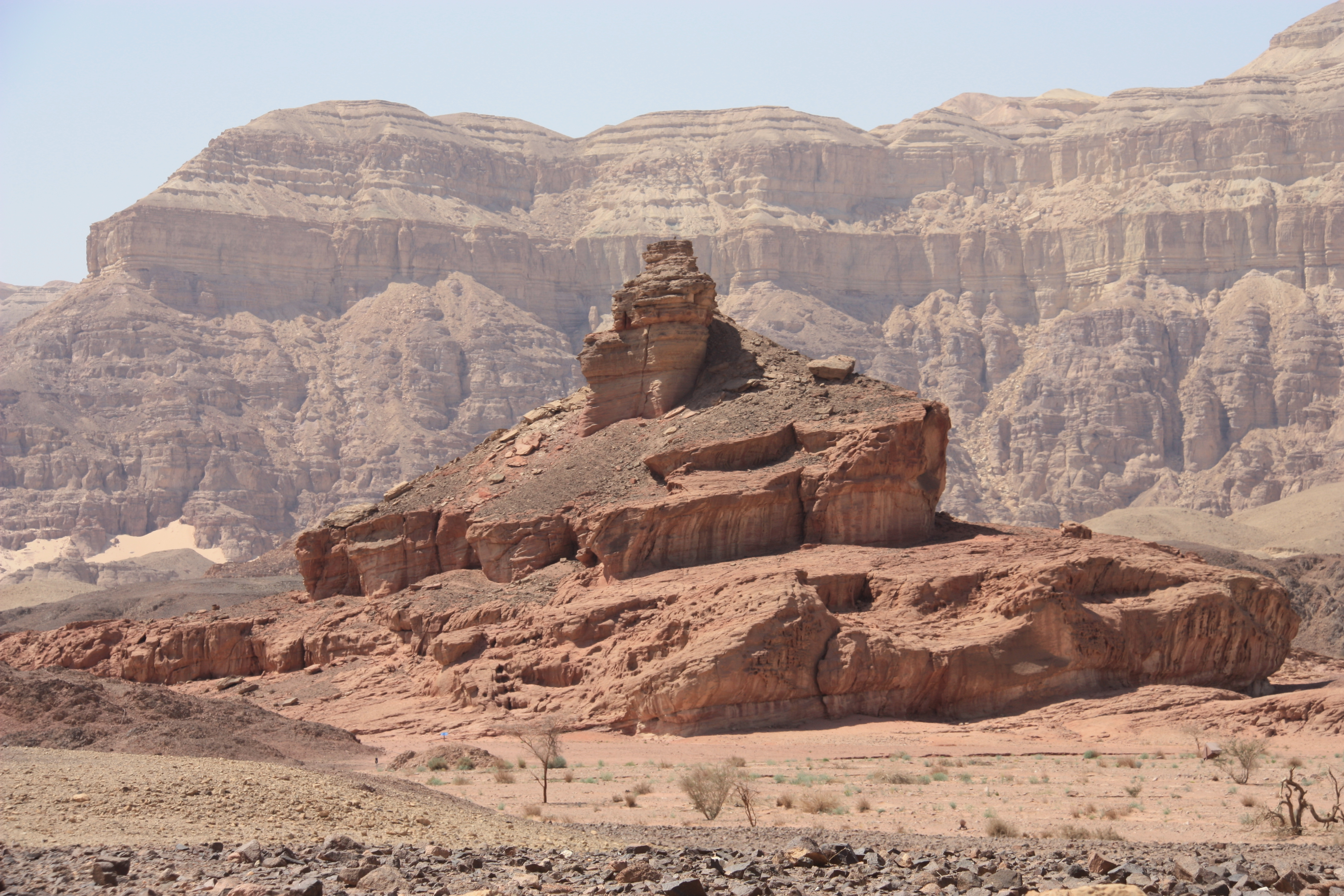 «Винтовой» холм - Долина Тимна